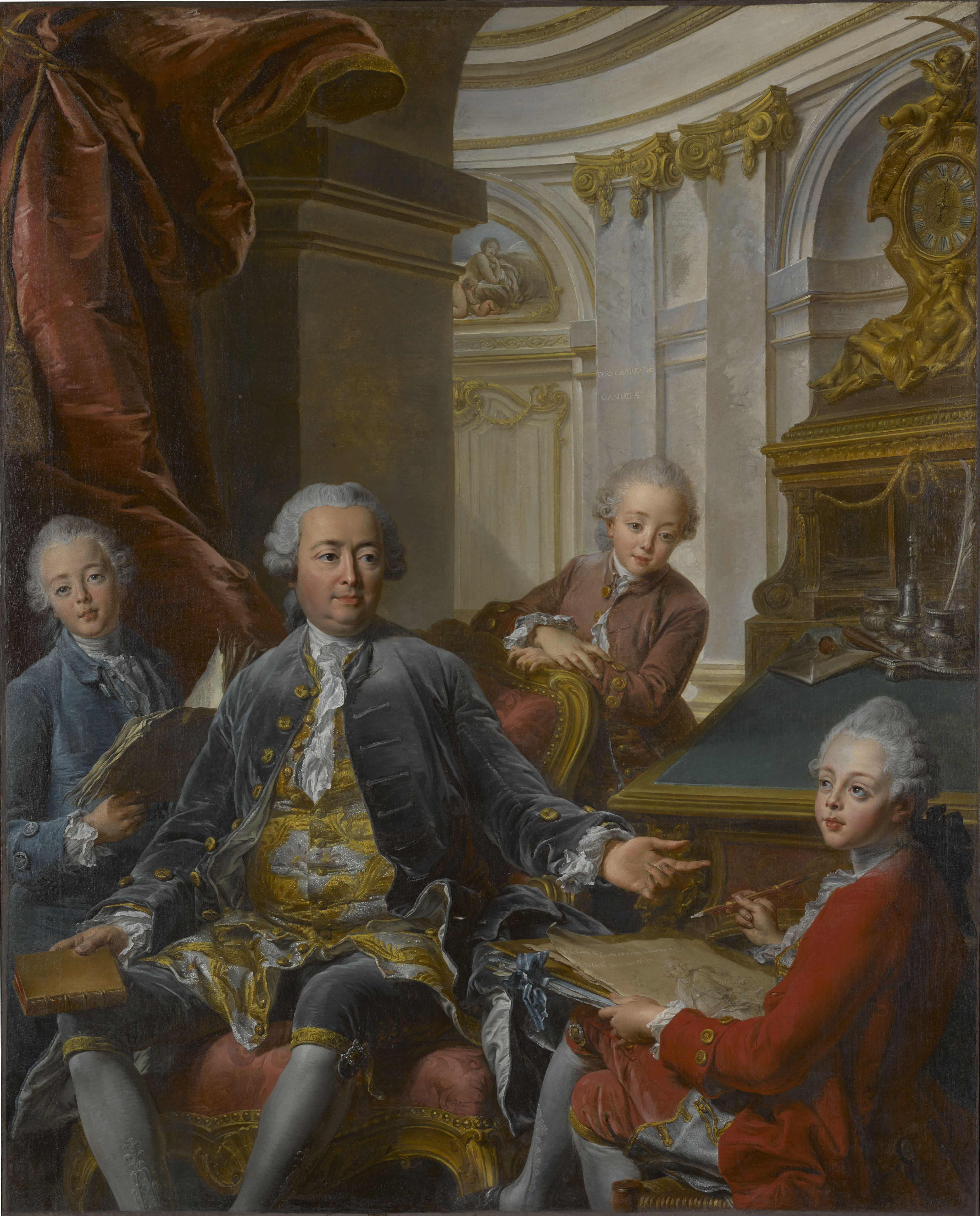 Après restauration